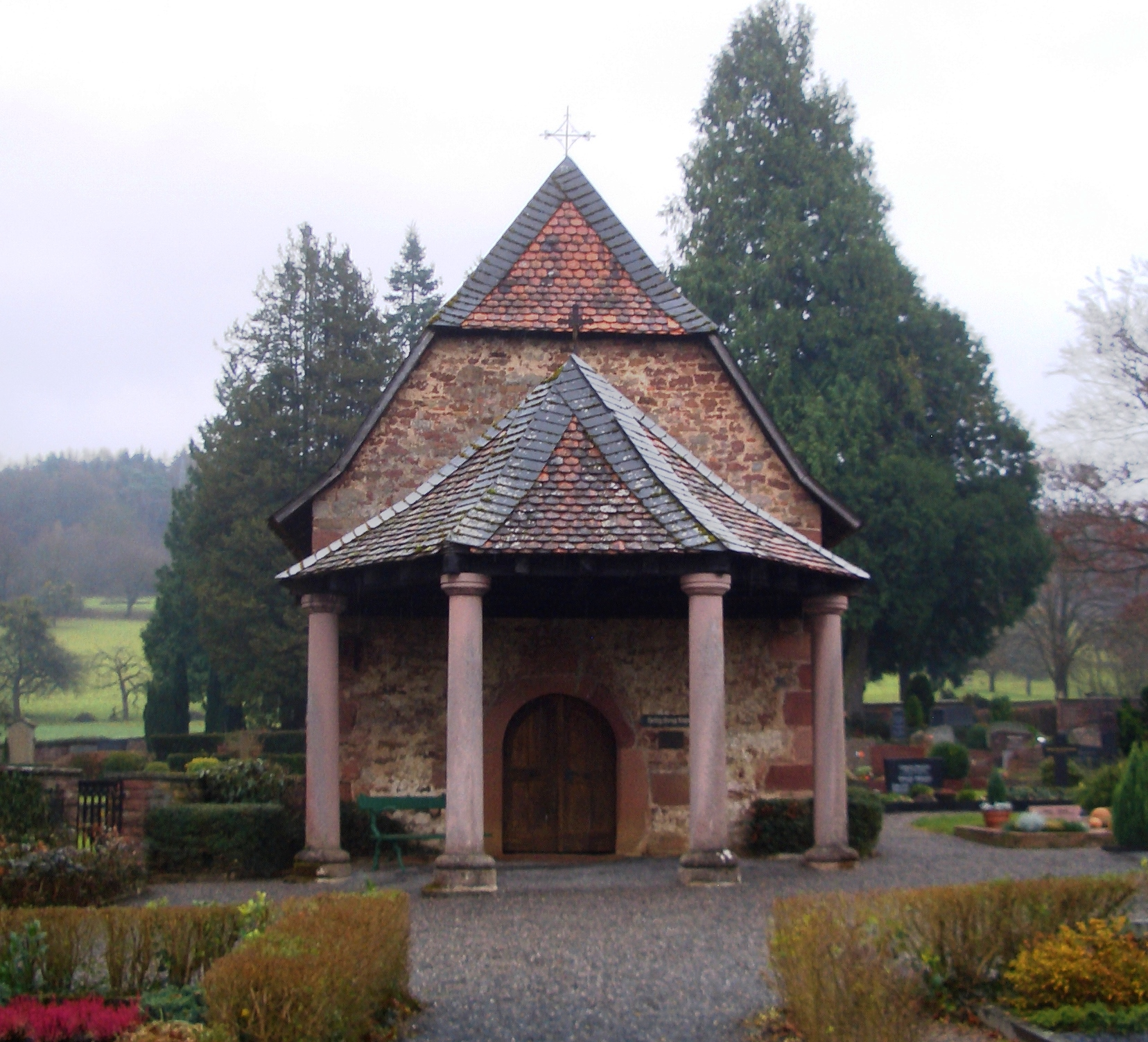 Heilig-Kreuz-Kapelle Michelstadt Westseite